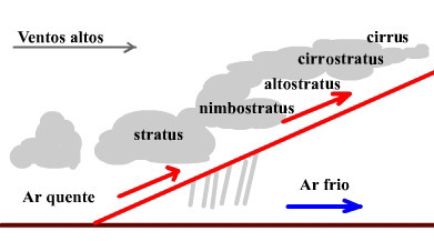 Nuvens nas frentes quentes (Warm front clouds)